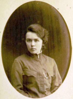 Анна Константиновна Дитерихс (1859—1927), жена Владимира Черткова